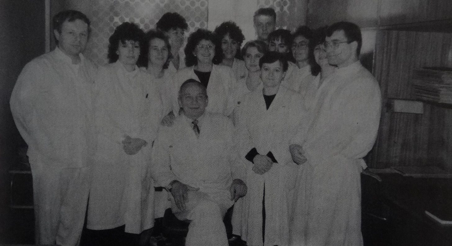 Szczecin, 1984 r. Oddział neurologiczny 109 Szpitala Wojskowego z ordynatorem płk lek. Wiesław Sobczyk